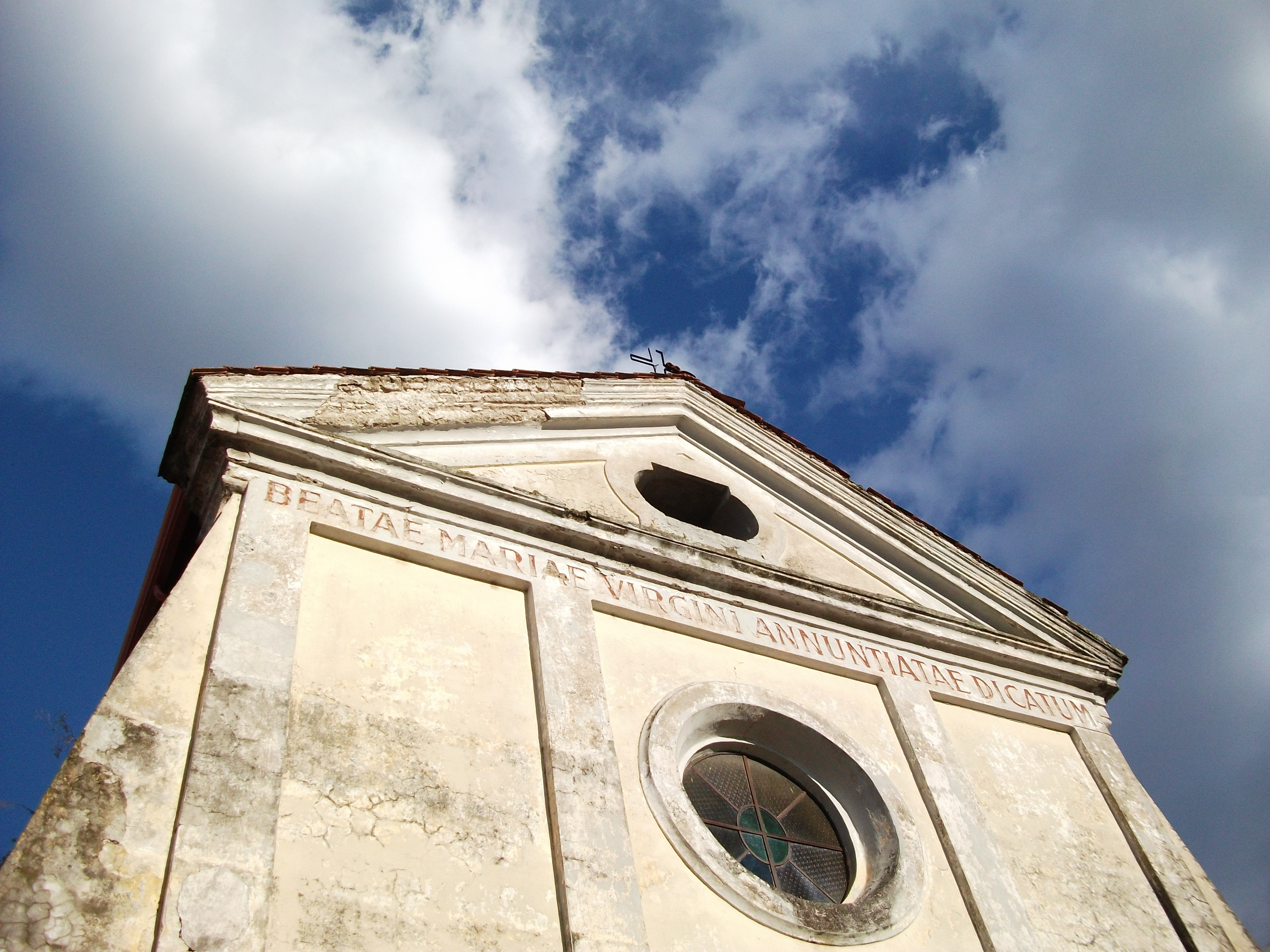 Arzano,Via Annunciata